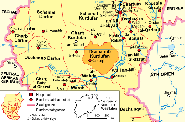 politische Karte des Sudan (Bundesstaat Dschanub Kurdufan)